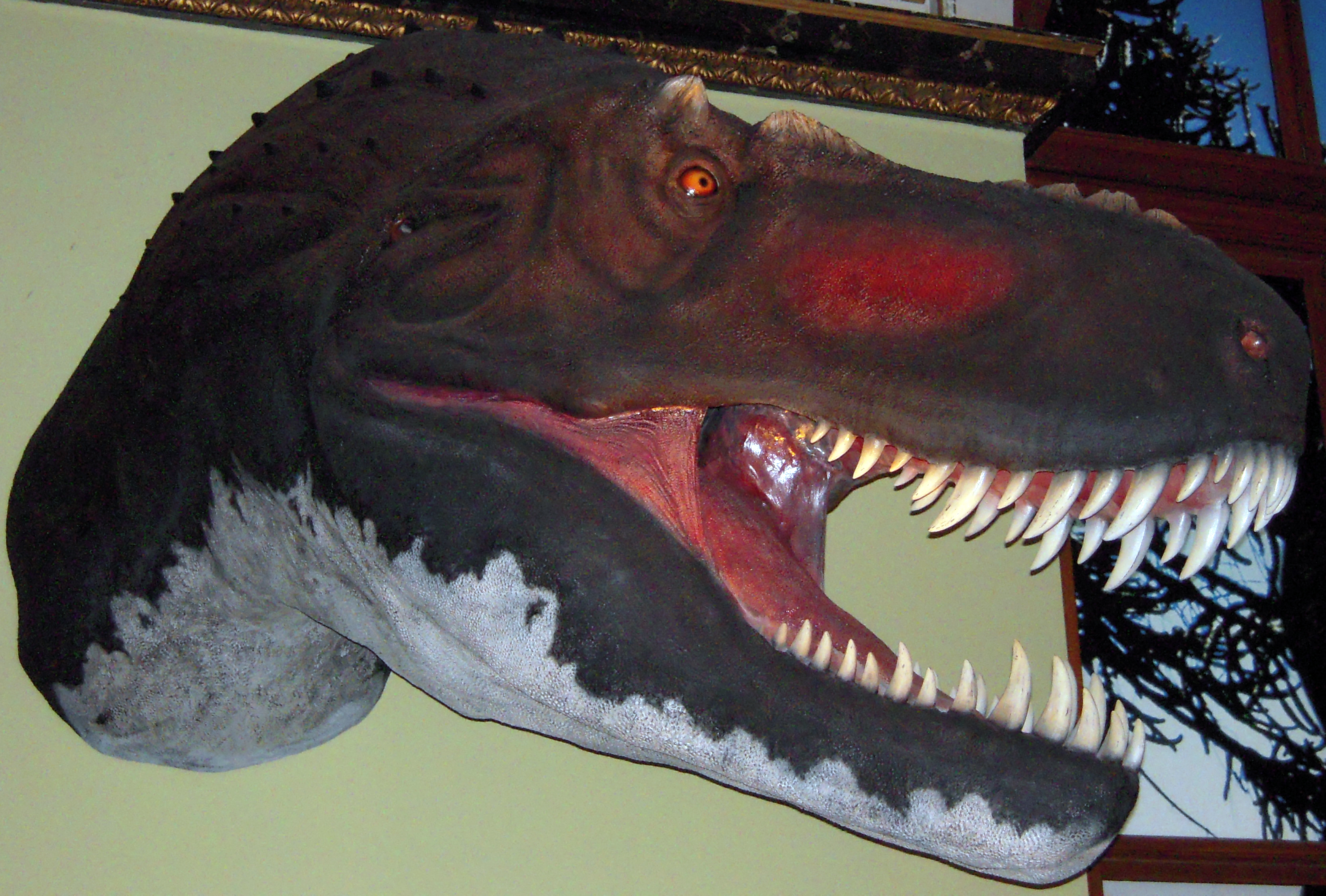 Lebendrekonstruktion eines Tyrannosaurus-rex-Schädels im Naturhistorischen Museum Wien